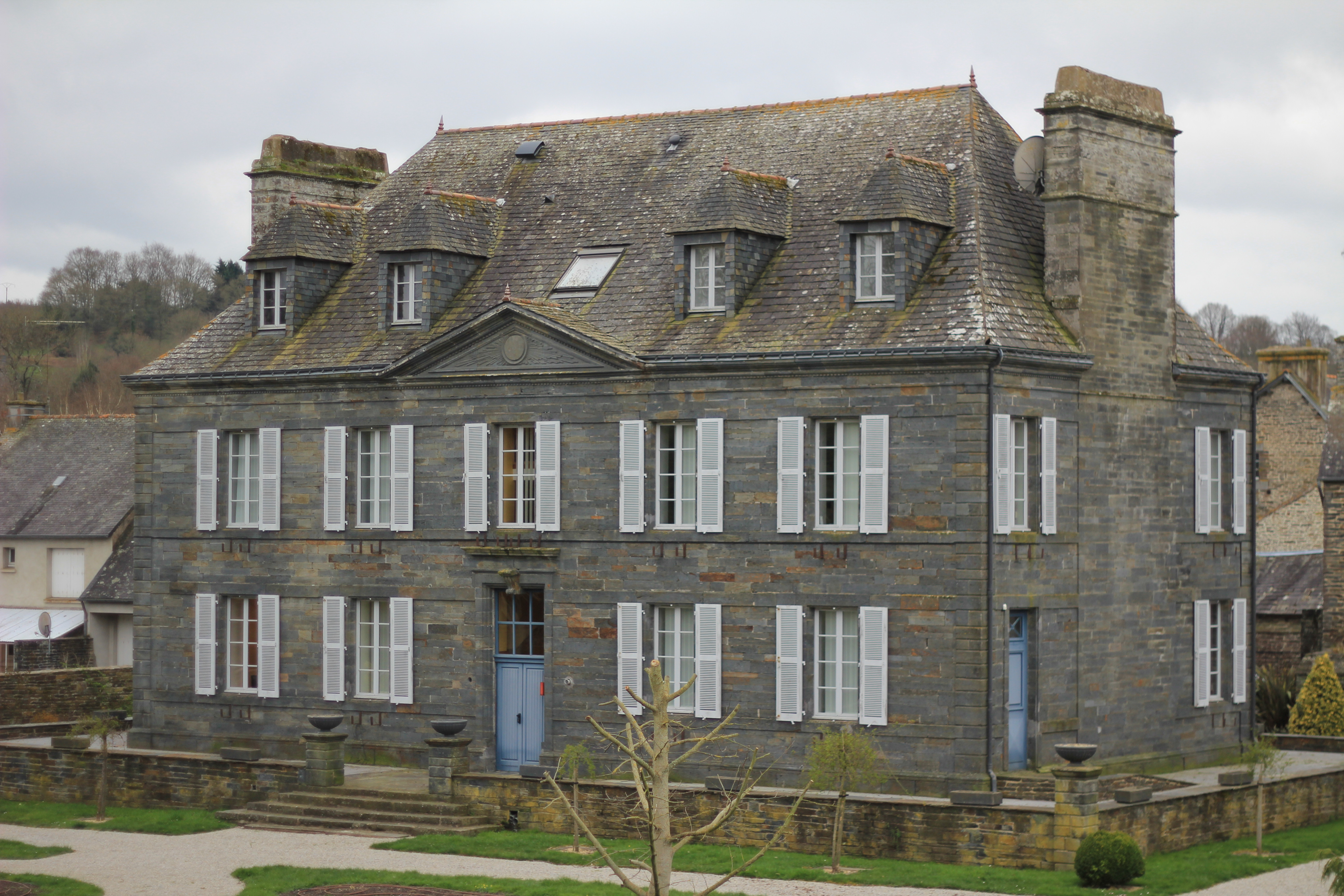 Mairie de Gouarec et ancien presbytère